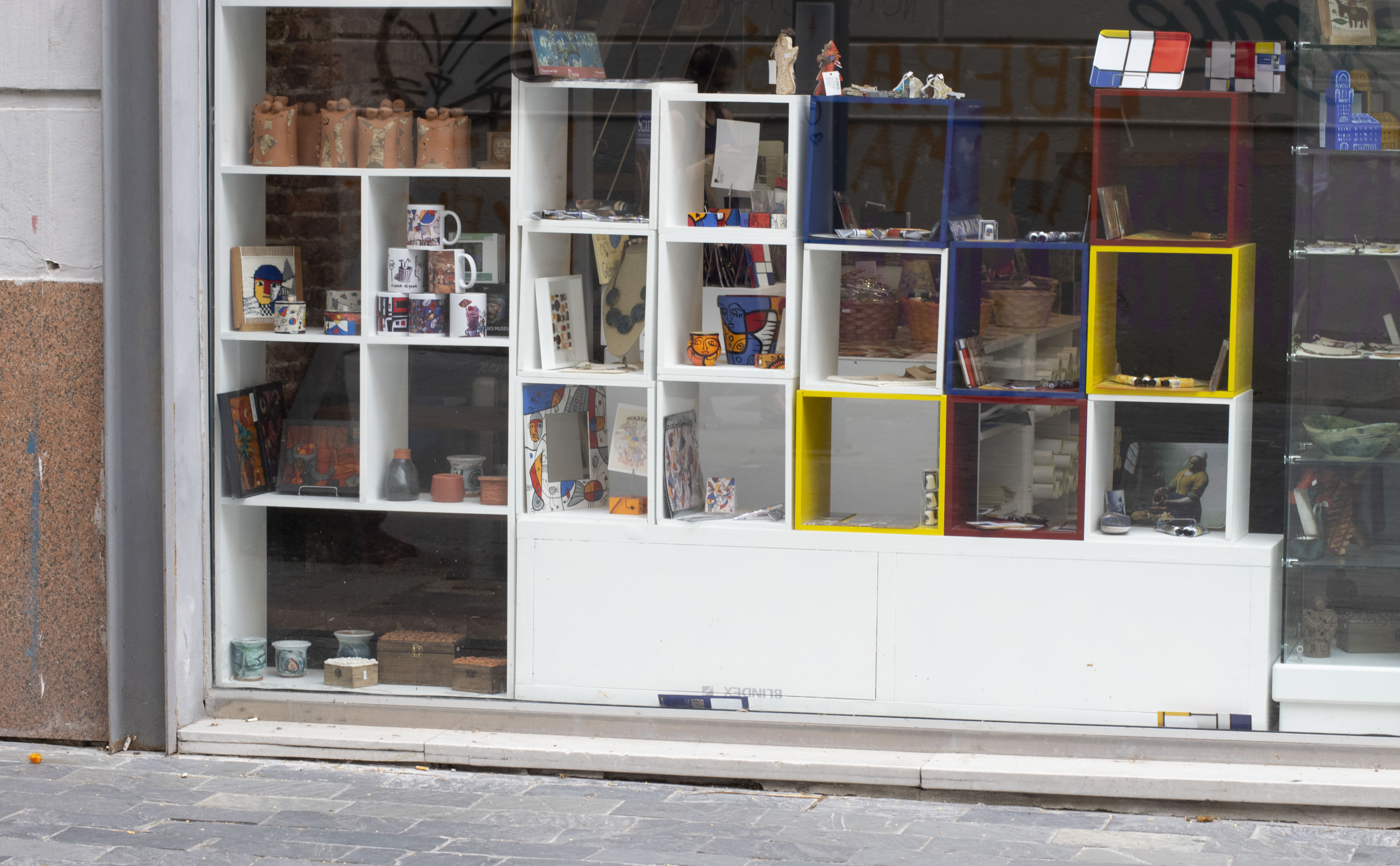 Frente del Museo Gurvich, Montevideo, Uruguay